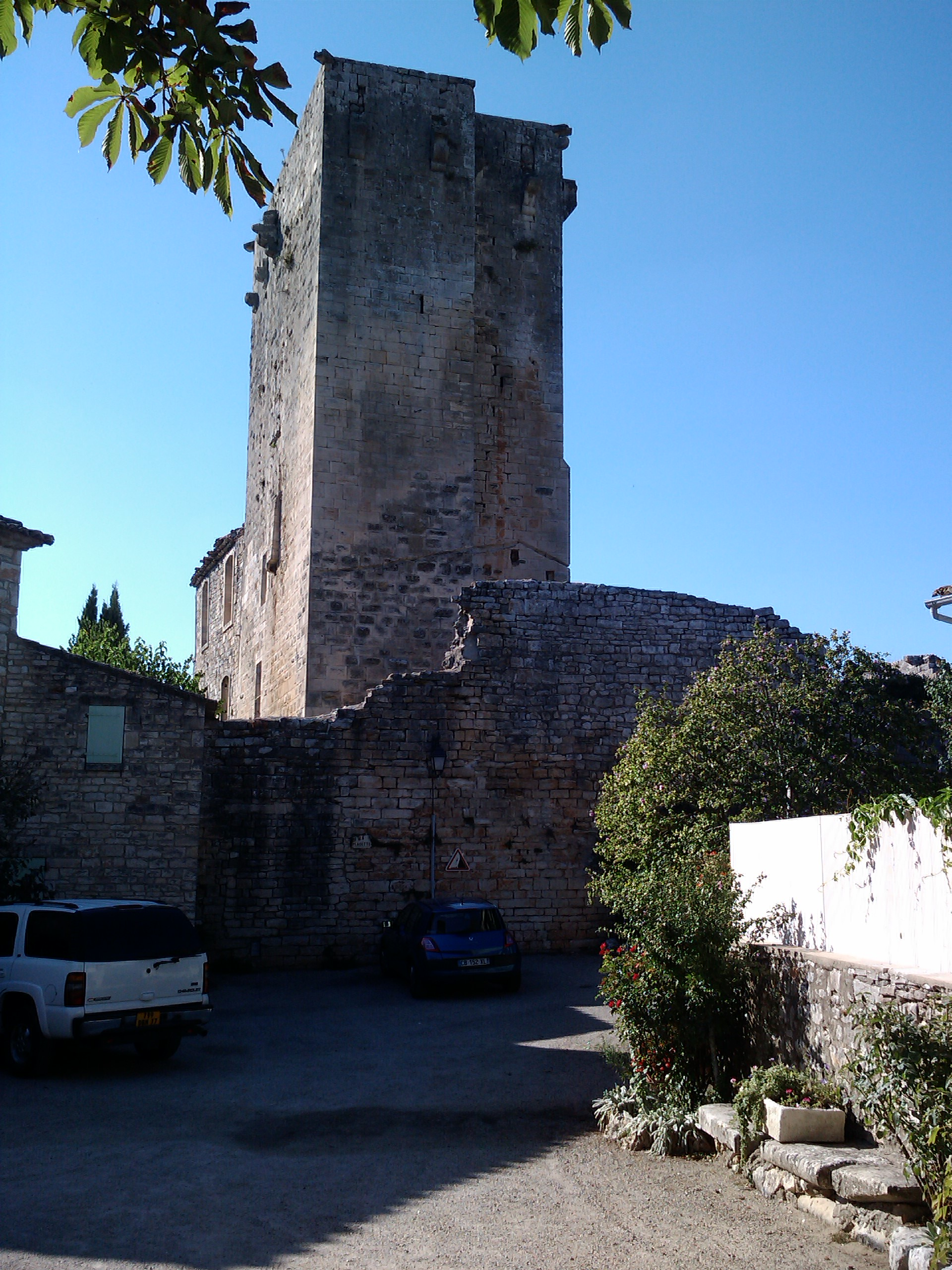 Château de Montclus .